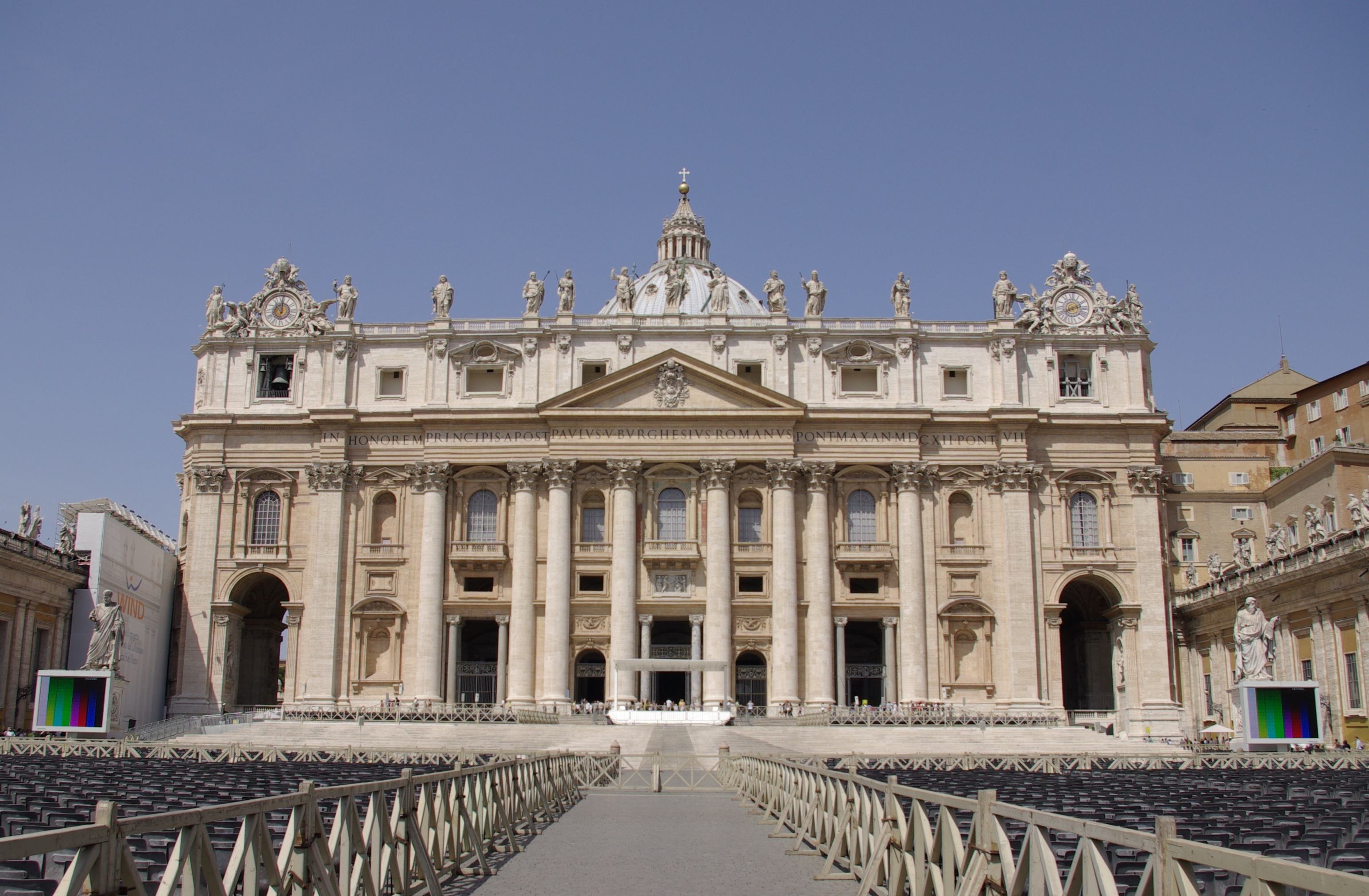 Der Petersdom in der Vatikanstadt